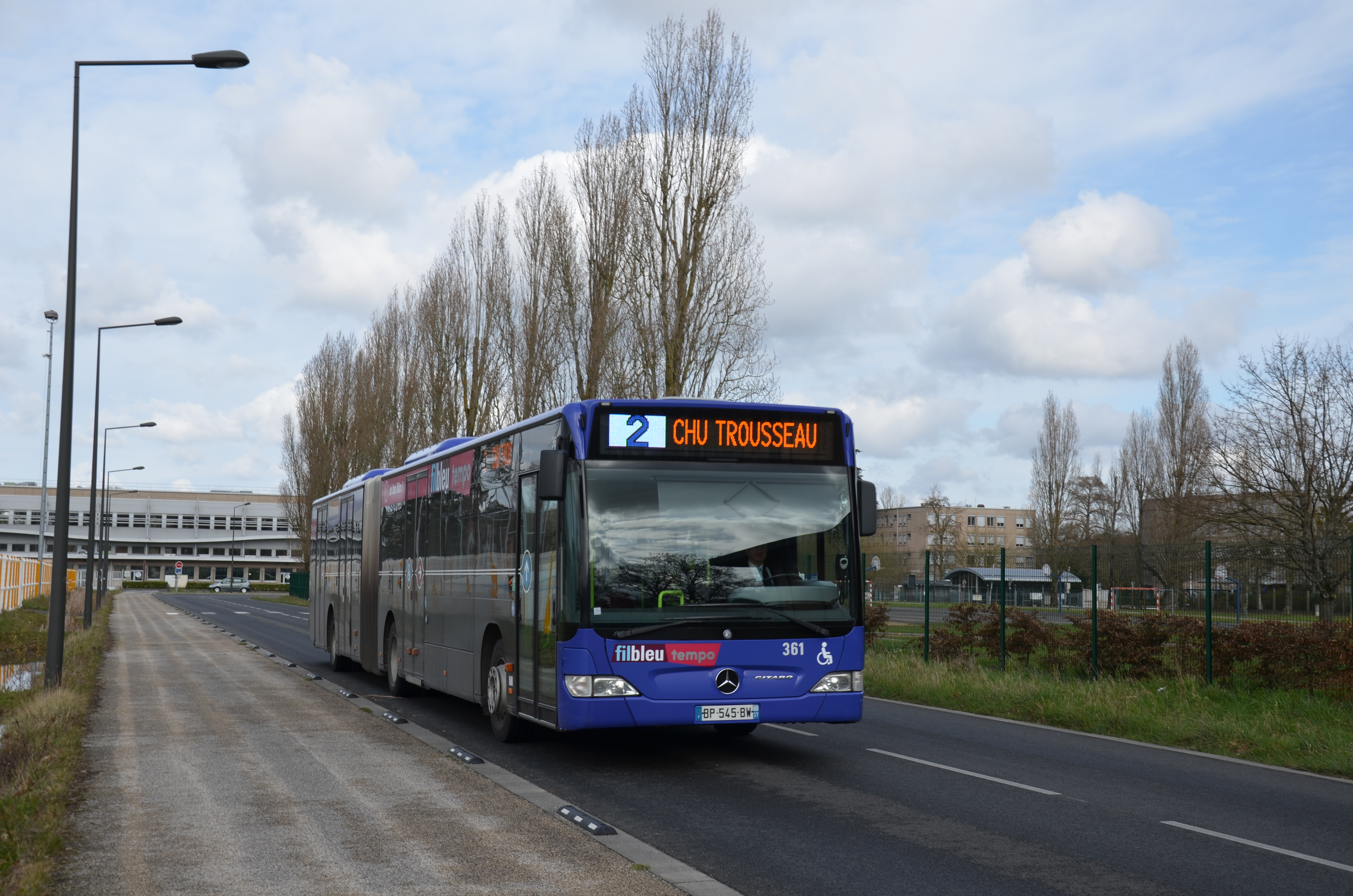 Mercedes Citaro G n°361 sur la ligne 2 du réseau Fil Bleu, sur le site propre du lycée Grandmont de Tours.